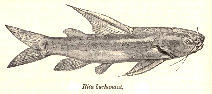 Rita buchanani = Rita rita (Hamilton, 1822)